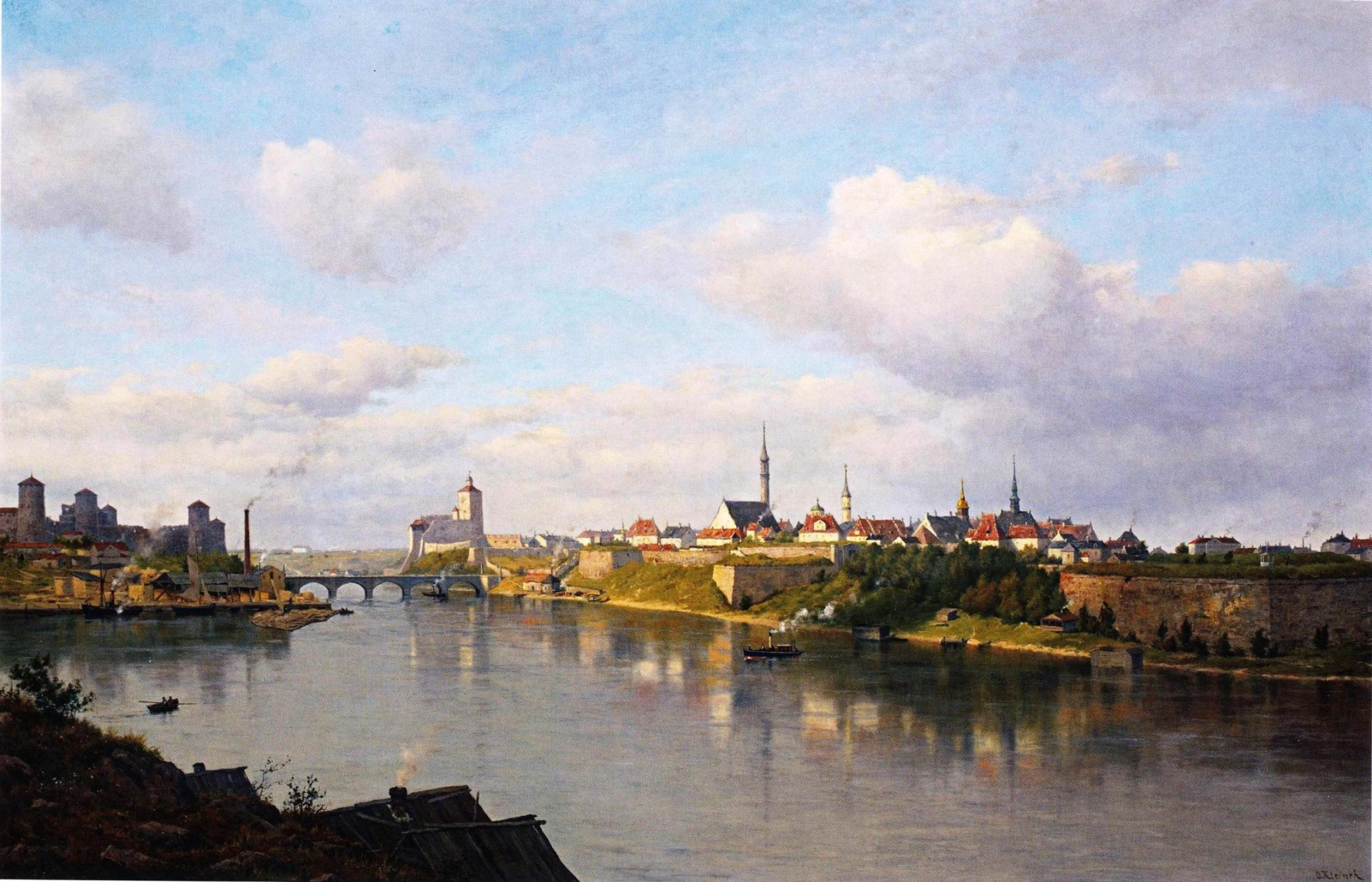 Oscar Kleinehin kaupunkinäkymä Viron Narvasta Narvajoen yli nähtynä. Maalaus kuuluu Fortumin Taidesäätiön kokoelmiin.